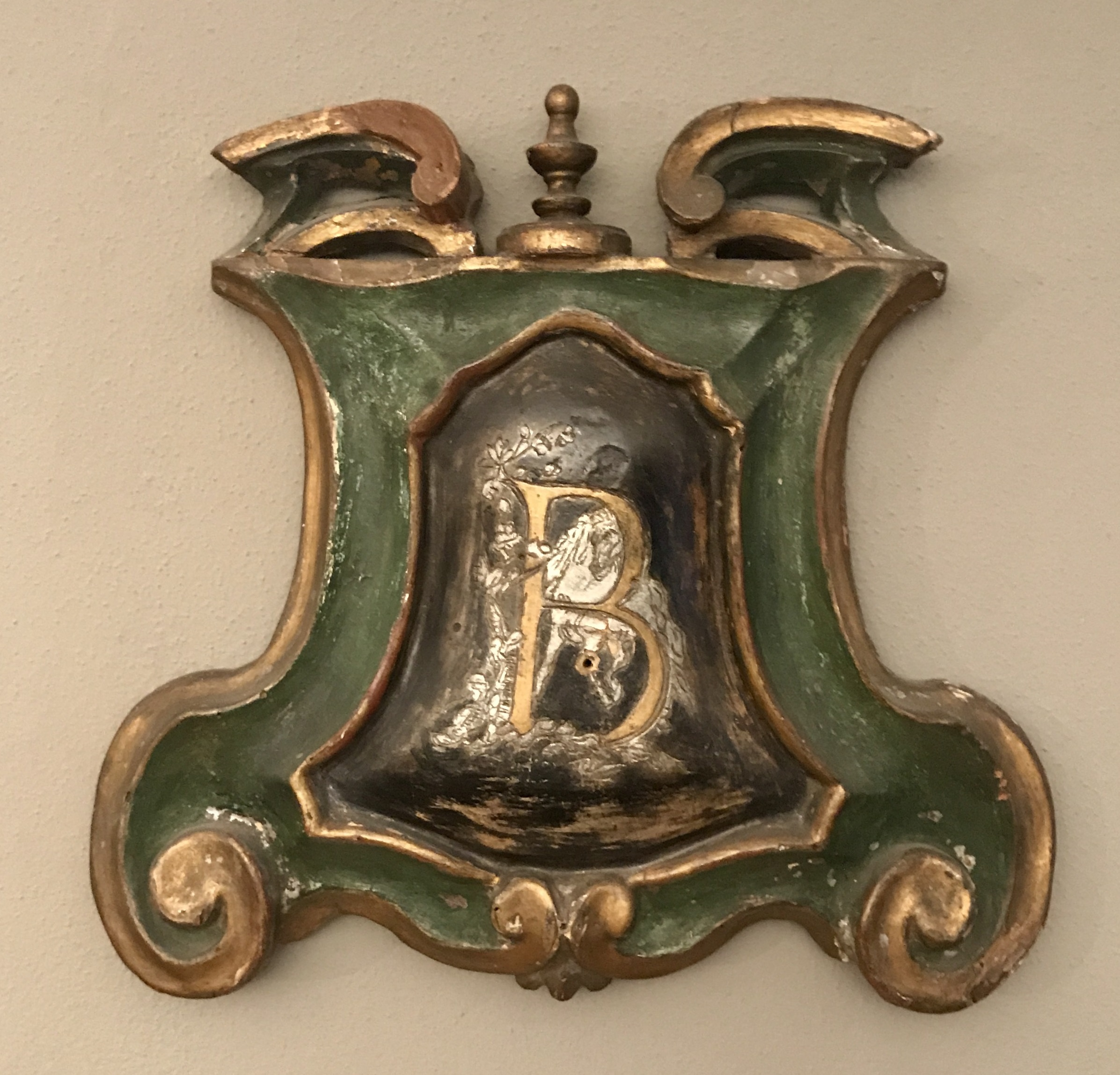 i Edizioni d'Arte, Logotipo su disegno di Giorgio De Chirico, Milano, 1914